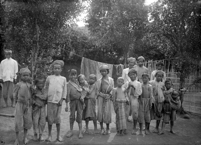 Negatief. Portret van een groep kinderen in het dorp Printji